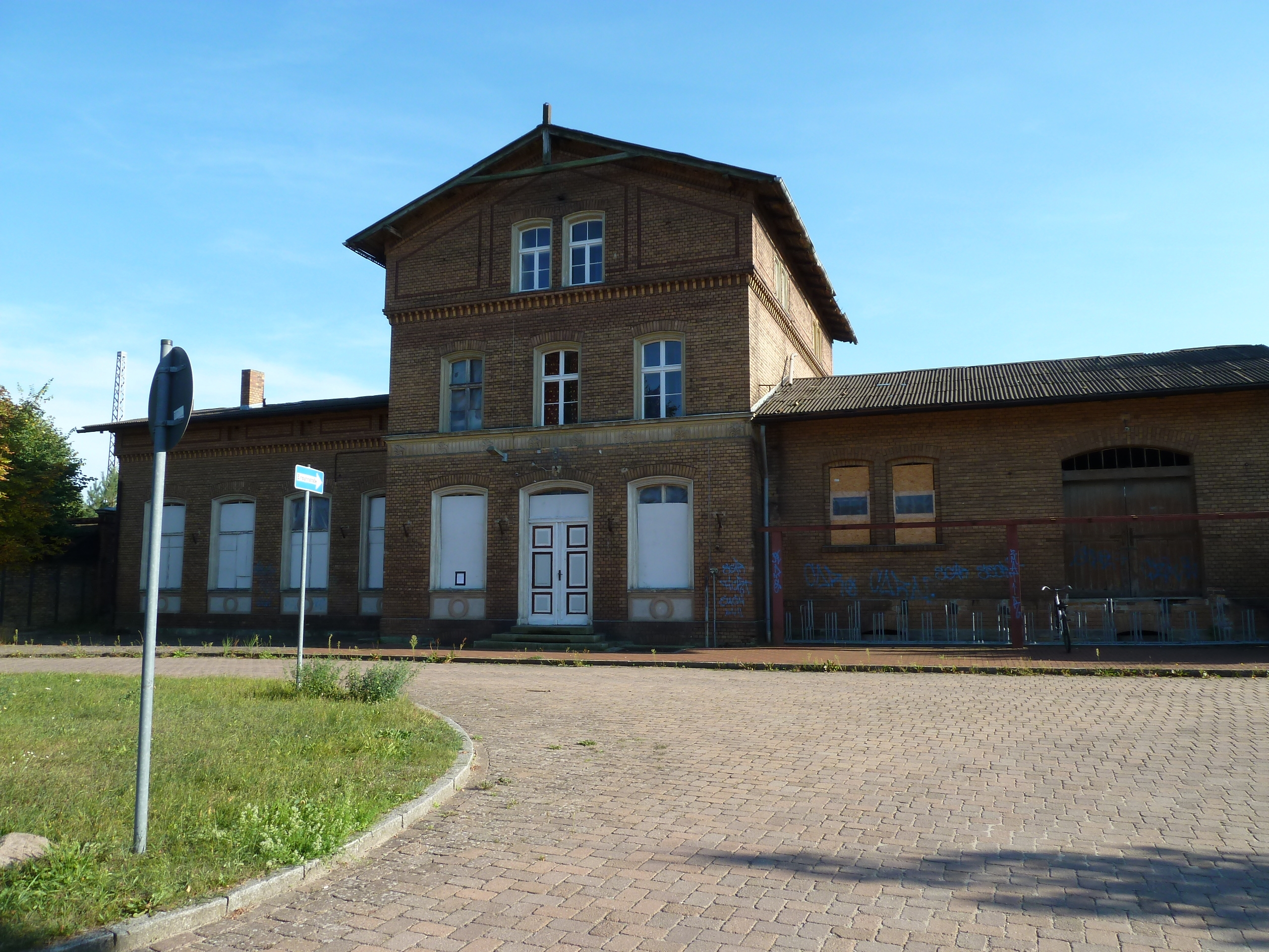 Bahnhof Nedlitz, Vorplatz mit Empfangsgebäude